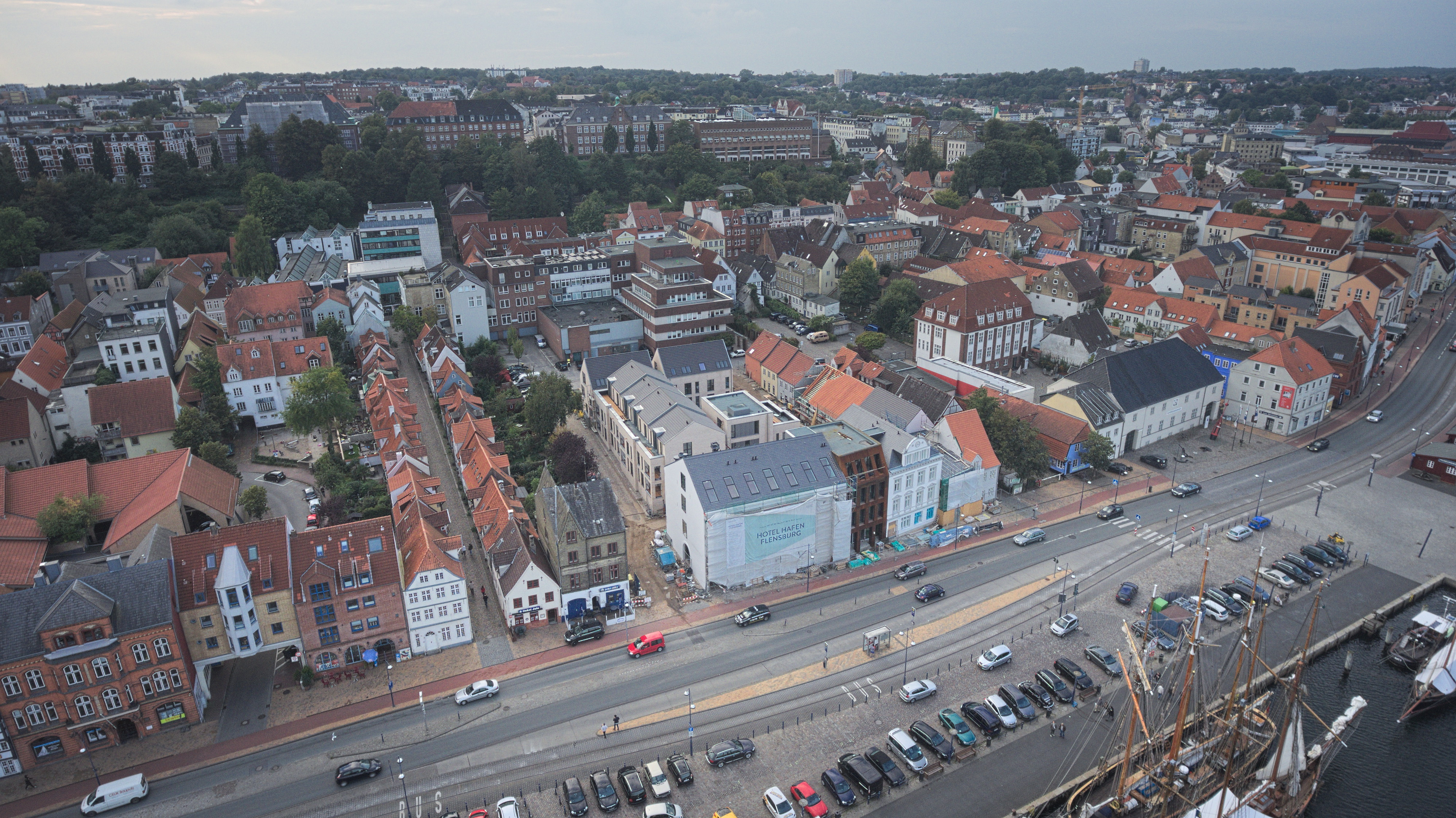 Blick auf den noch im Bau befindlichen Hotelhafen Flensburg.